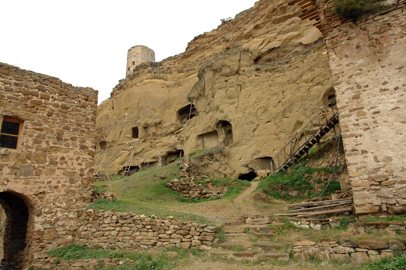 Natlismtsemeli Monastery Georgia